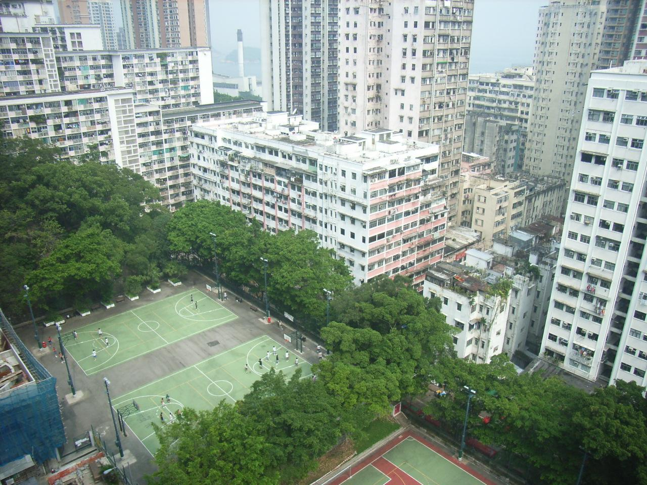 Forbes Street, 科士街, Kennedy Town, Hong Kong (By KennethTom).